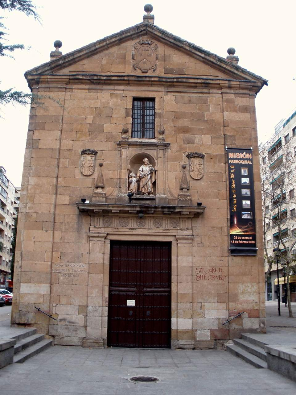 Salamanca - Iglesia de Santa Maria del Monte Carmelo